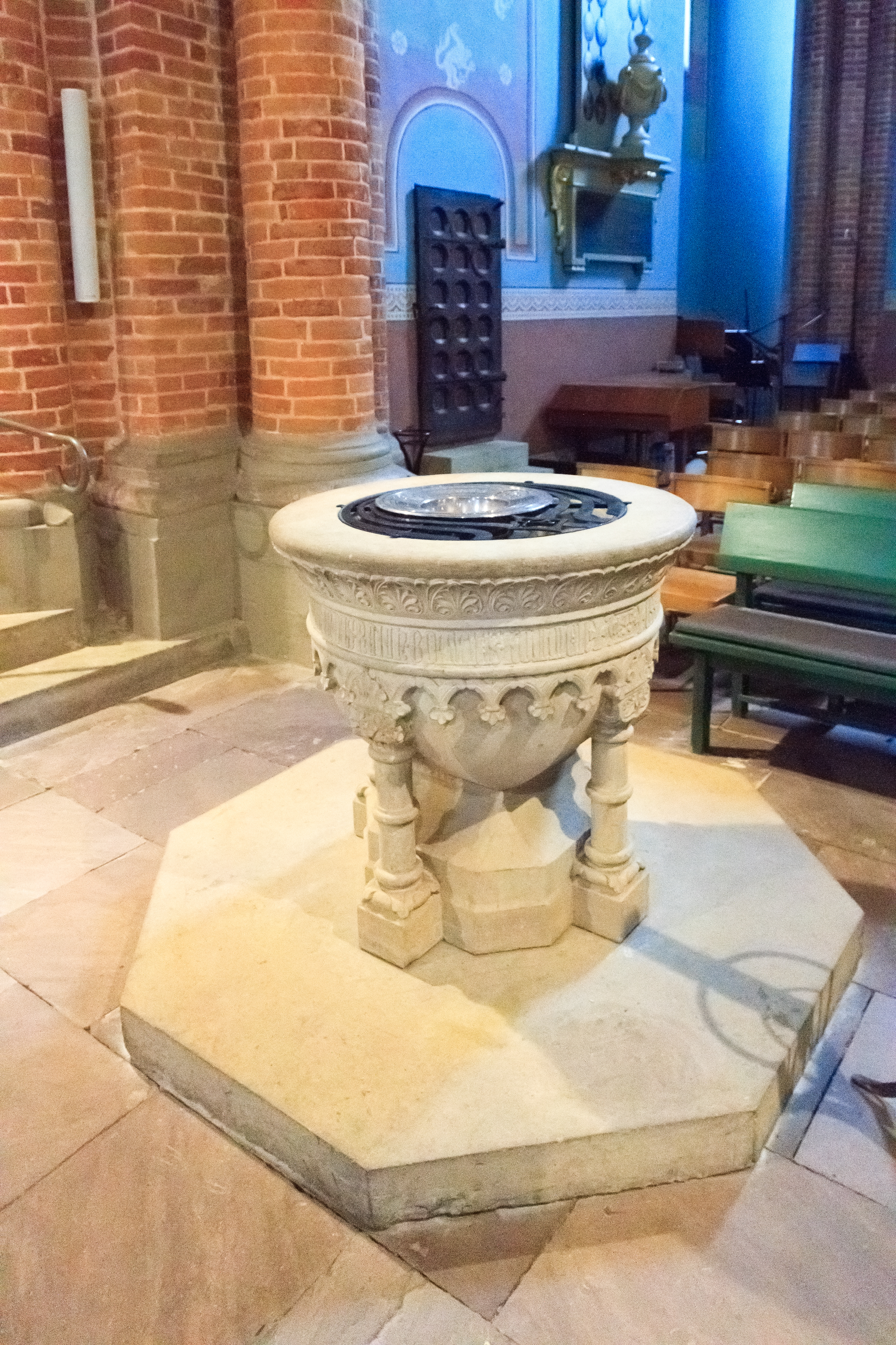 Taufstein der Stiftskirche St. Mauritius und St. Viktor (Bassum).